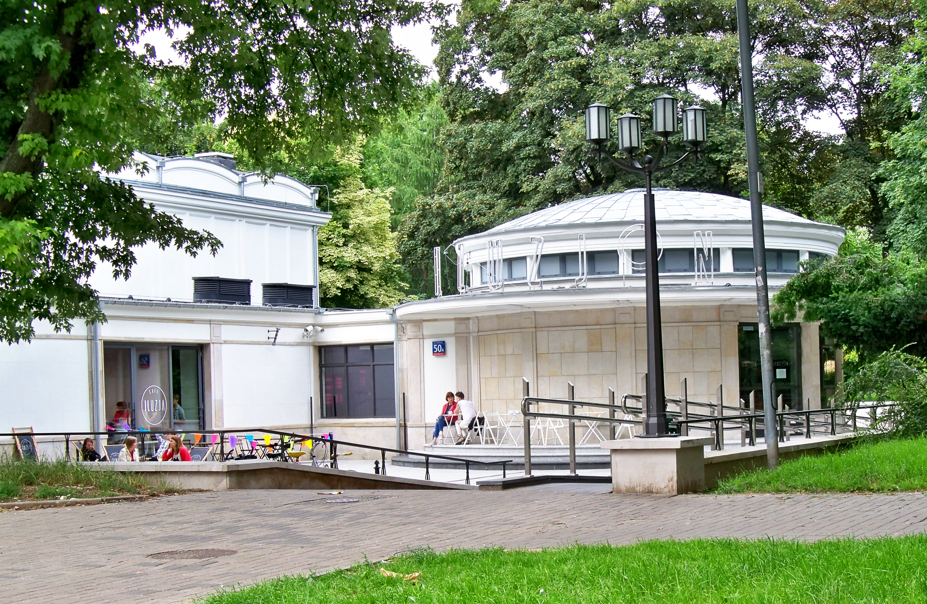 Kino Iluzjon po remoncie na przełomie 1 i 2 dekady XXI w.